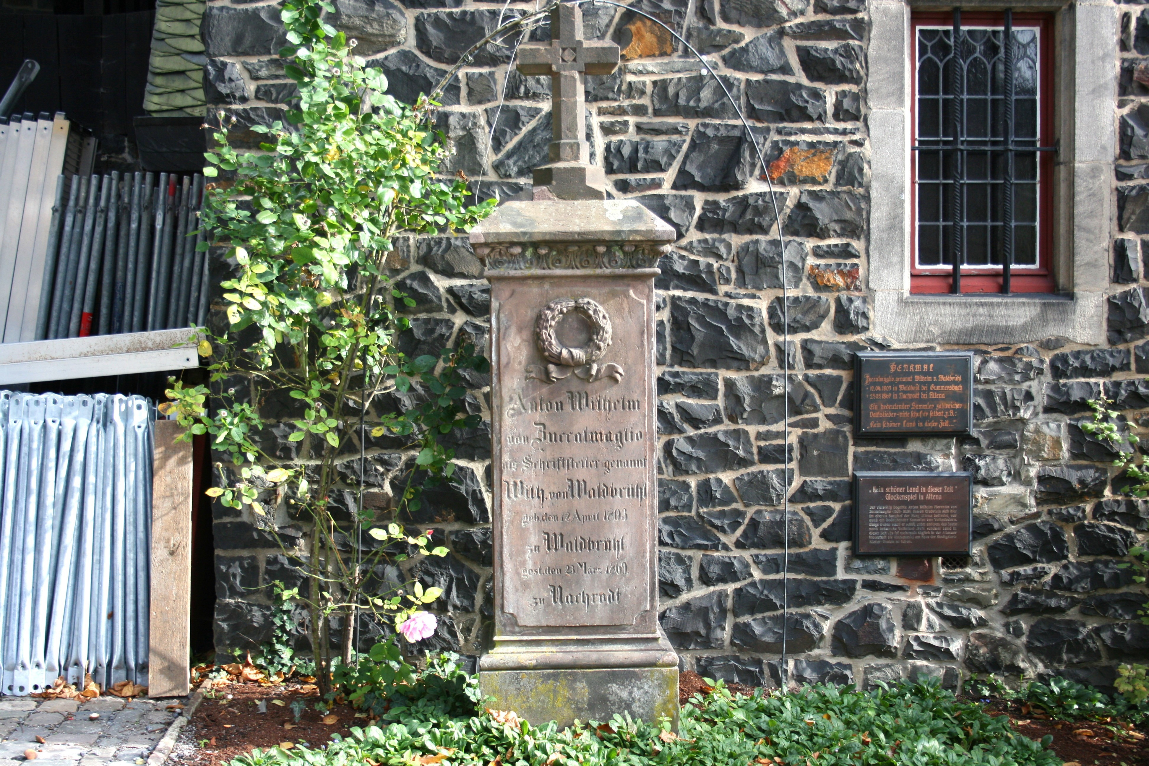 Zuccalmaglio-Denkmal auf der Burg Altena in Altena